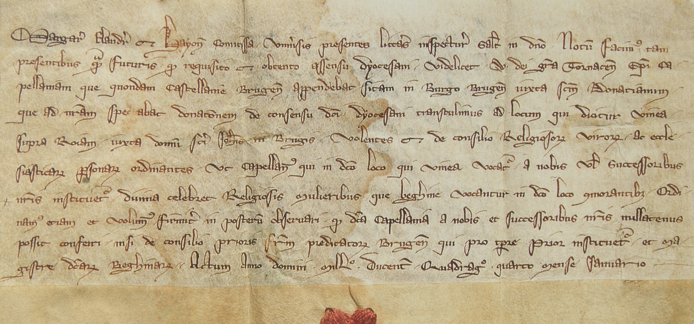 Stichtingsoorkonde van het begijnhof te Brugge, mei 1245.